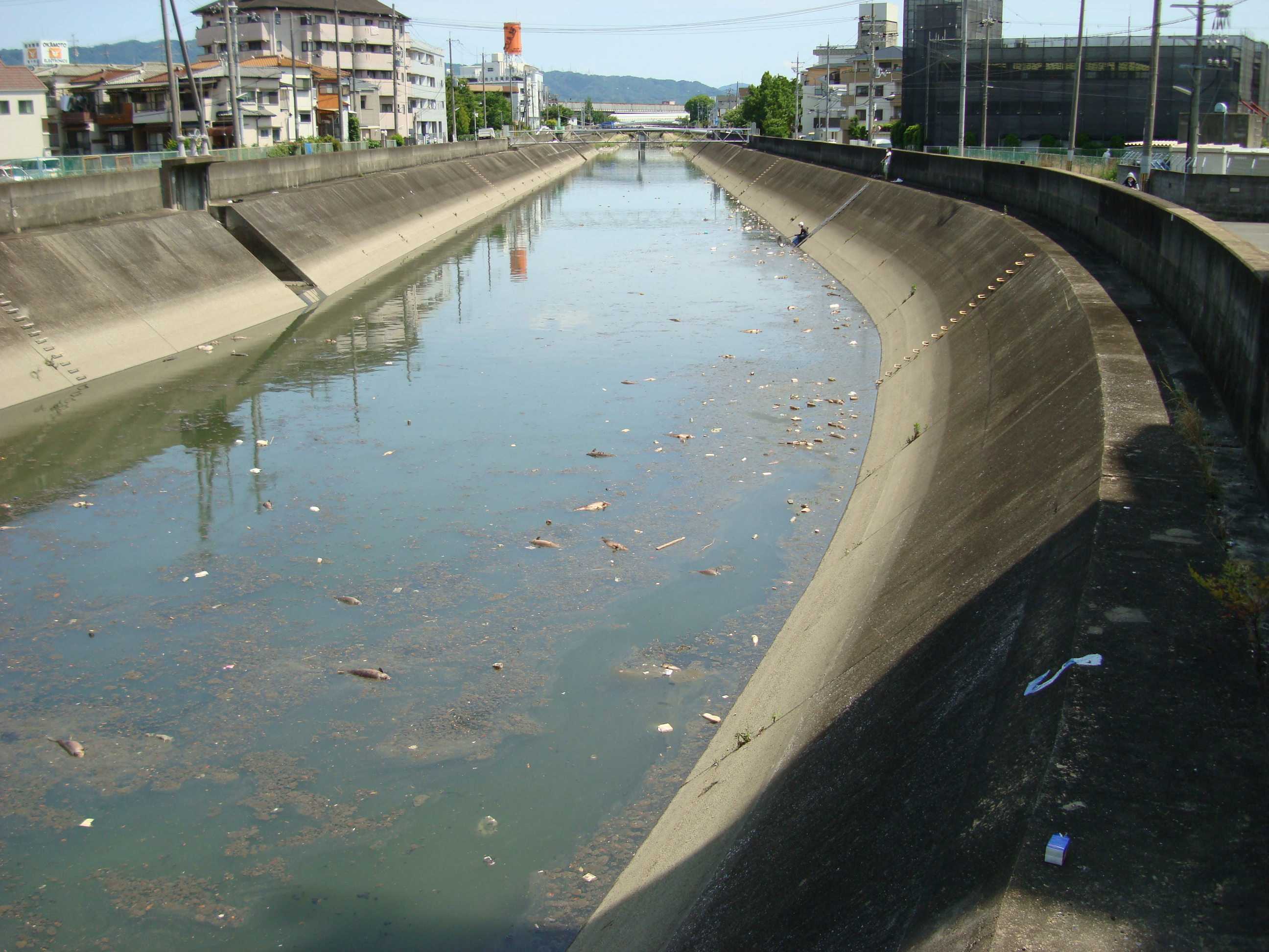 第二寝屋川汚染